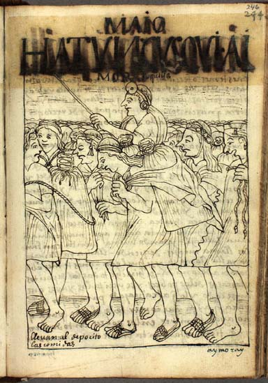 Aymoray Quilla